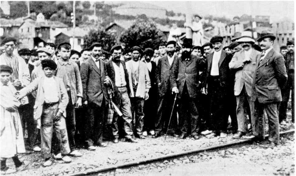 Facundo Perezagua eta grebalariak, 1910